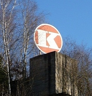 das Firmenlogo der Kapsreiter-Gruppe im Steinbruch "Gindsbruch" in Gopperding, Gemeinde St. Florian am Inn, Bezirk Schärding, Österreich